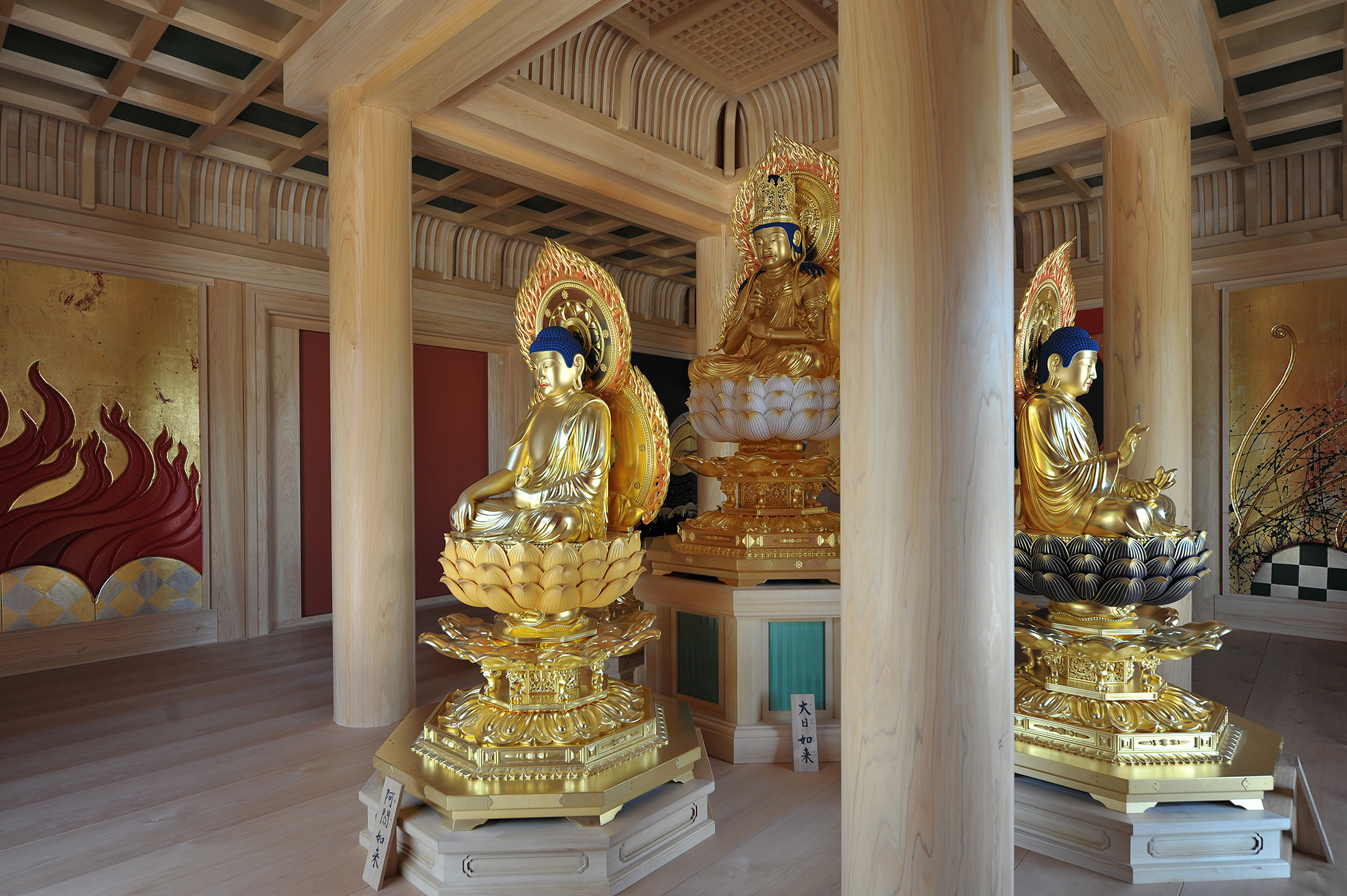 2018年5月12日に落成した蓮華院多宝塔（熊本県玉名市）。その内部に祀られる五智如来と障壁画。毎年1月13日・4月29日・6月13日にご開帳。